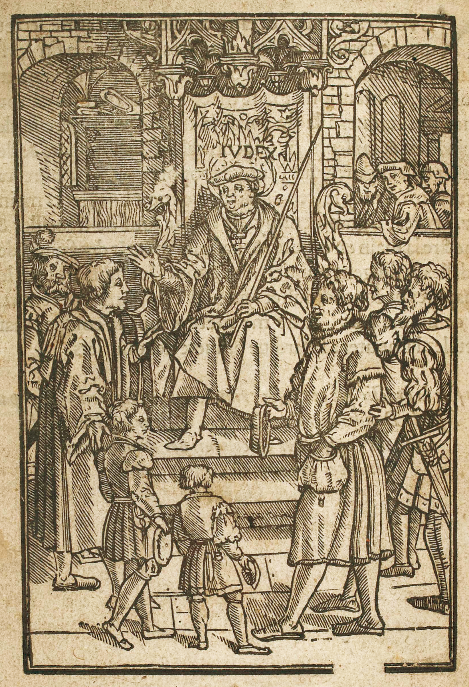 Gravure